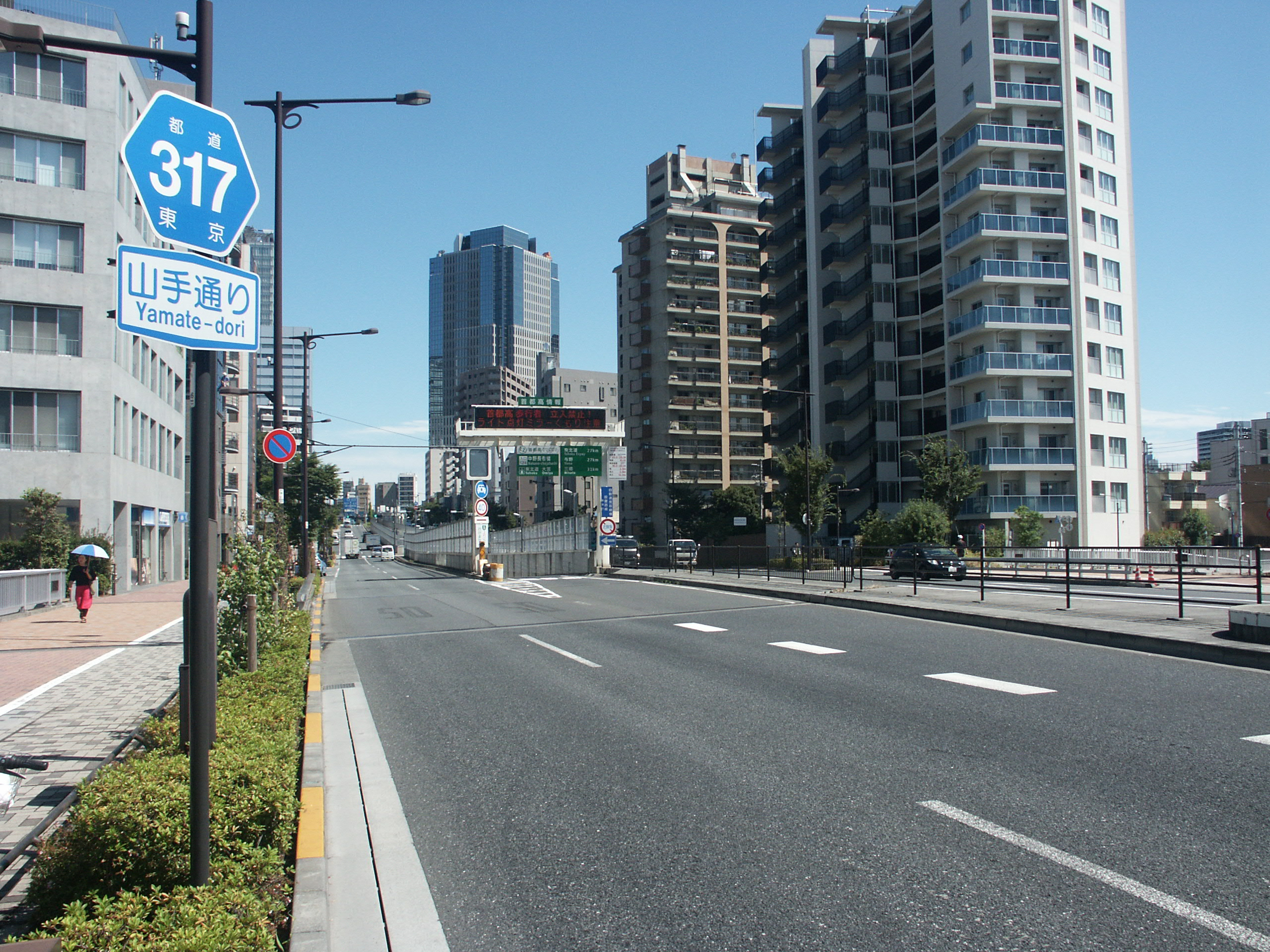 東京都道317号線（山手通り）中野区弥生町1丁目付近（東中野方面を撮影）